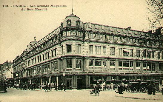 Carte Postale Le Bon Marché à Paris Vers la fin 19è siècle